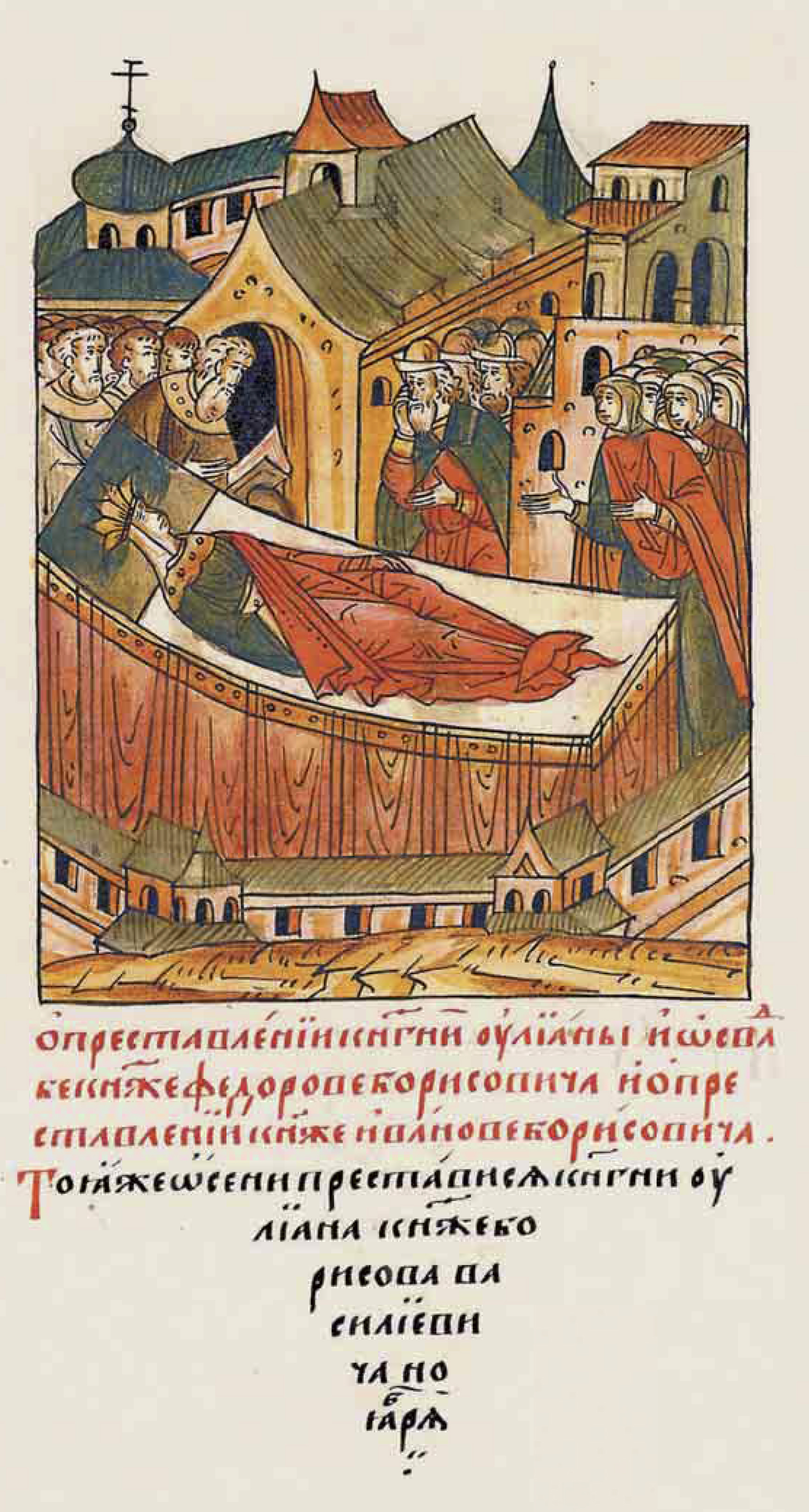 О кончине княгини Ульяны и о свадьбе князя Федора Бори- совича, и о кончине князя Ивана Борисо- вича. В ту же осень в ноябре скон- чалась княгиня Ульяна князя Бориса Васильевича